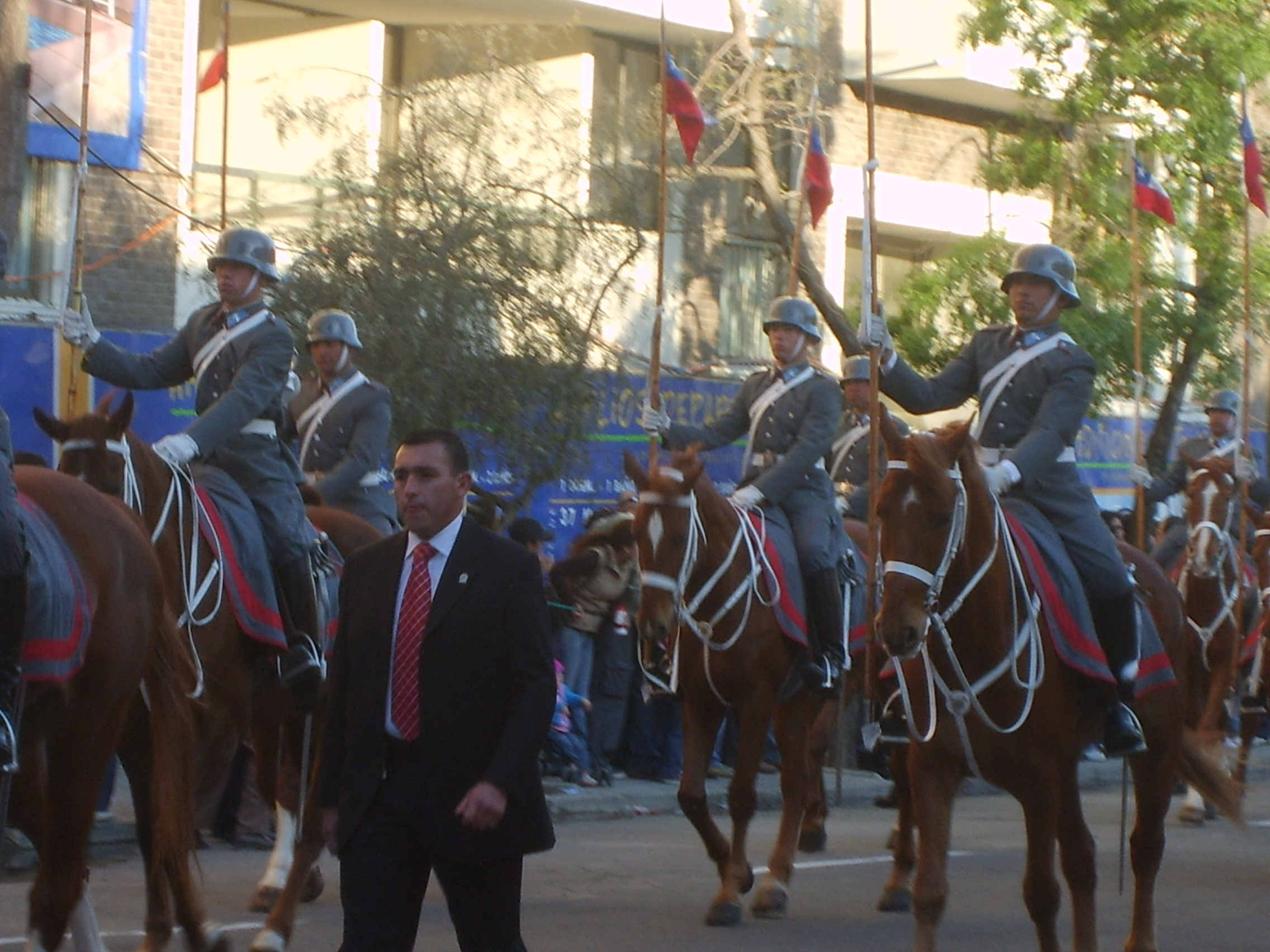 Fotografía del Regimiento Granaderos a Caballo